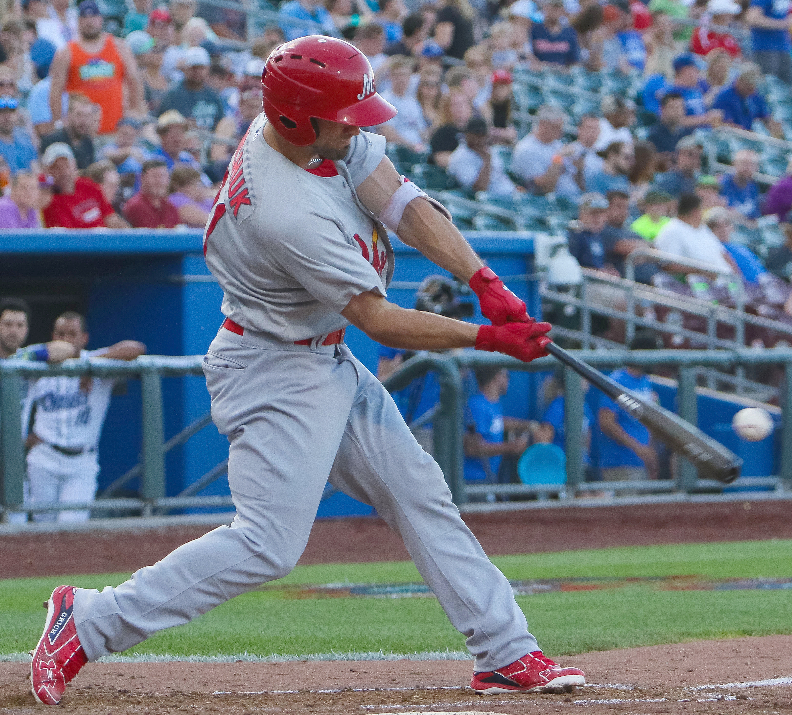 Randal Grichuk